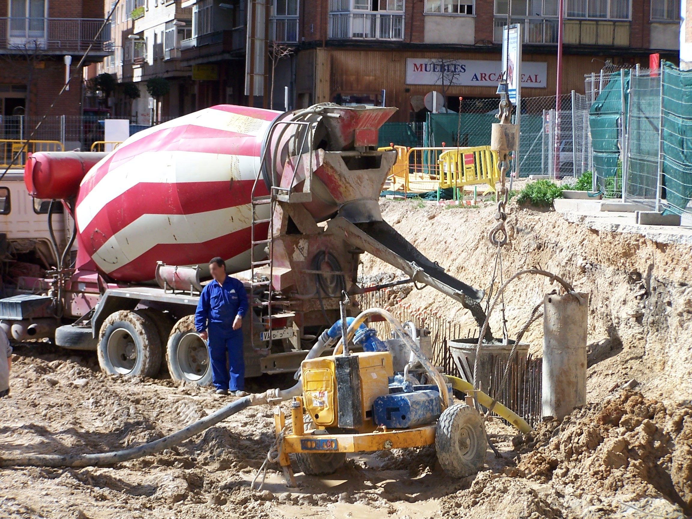 Es una foto con el hormigonado de un muro pantalla de la construcción de un aparcamiento subterráneo en Valladolid.